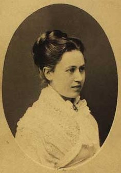 Elisabeth Christiane Alvina Wandel, née Møller (1850-1926), Danish painter